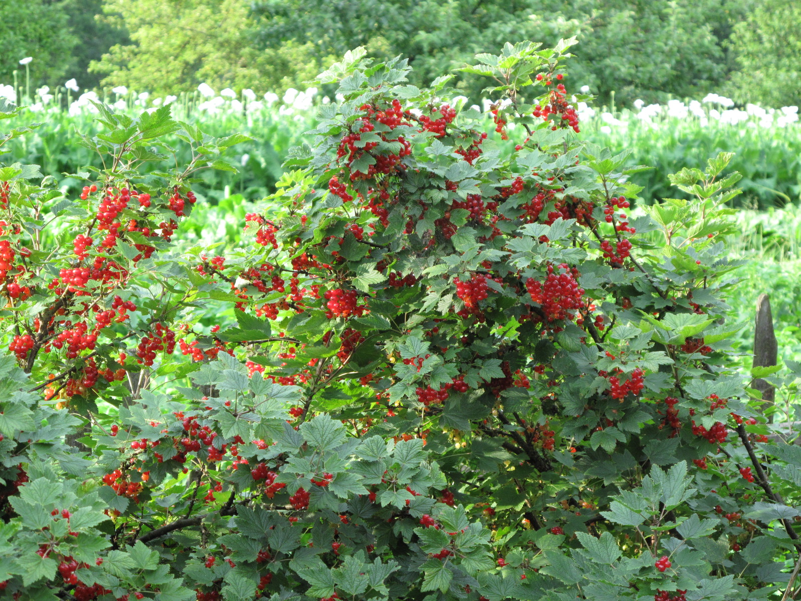 Červený rybíz, keř